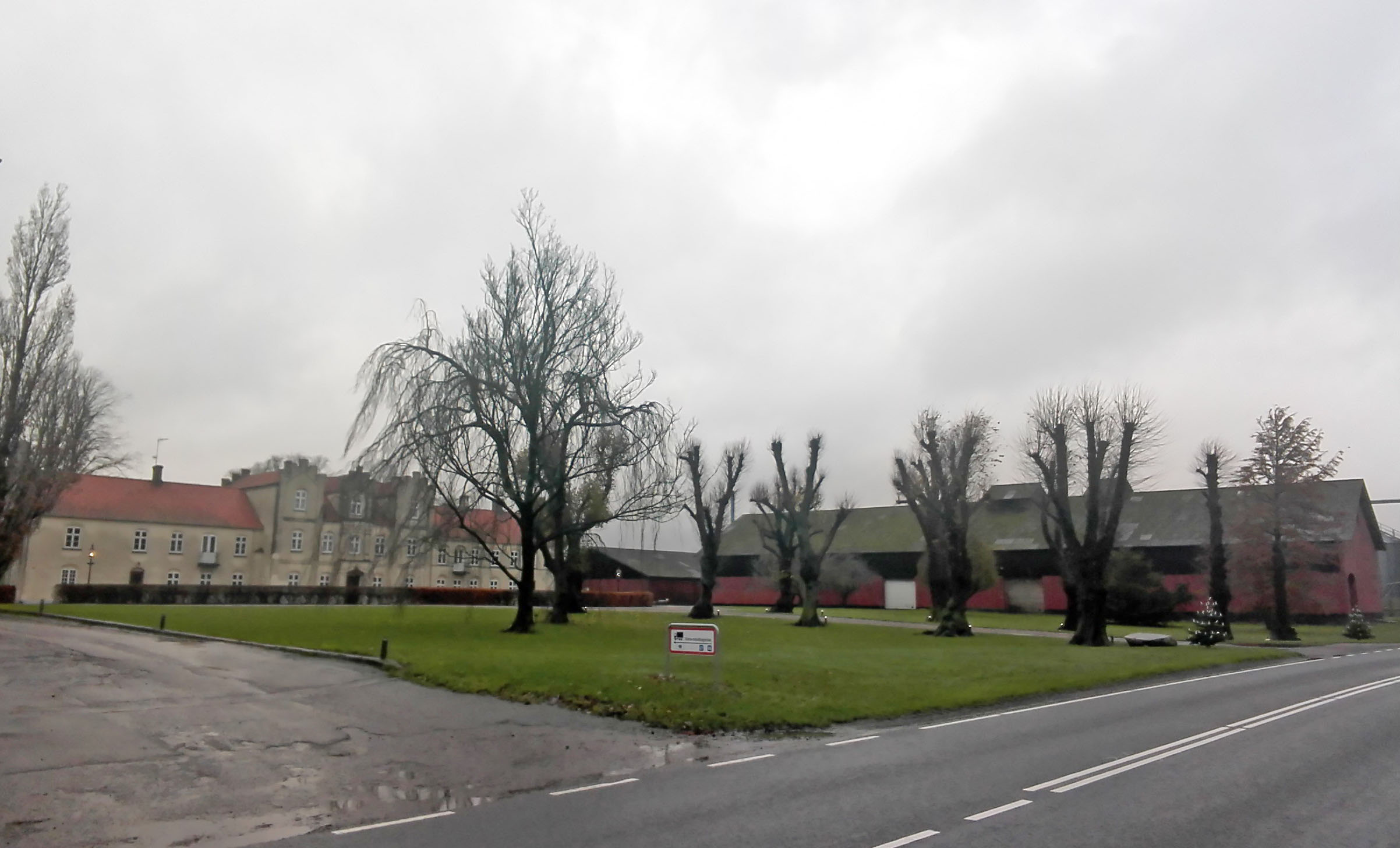 Herregården Egemarke